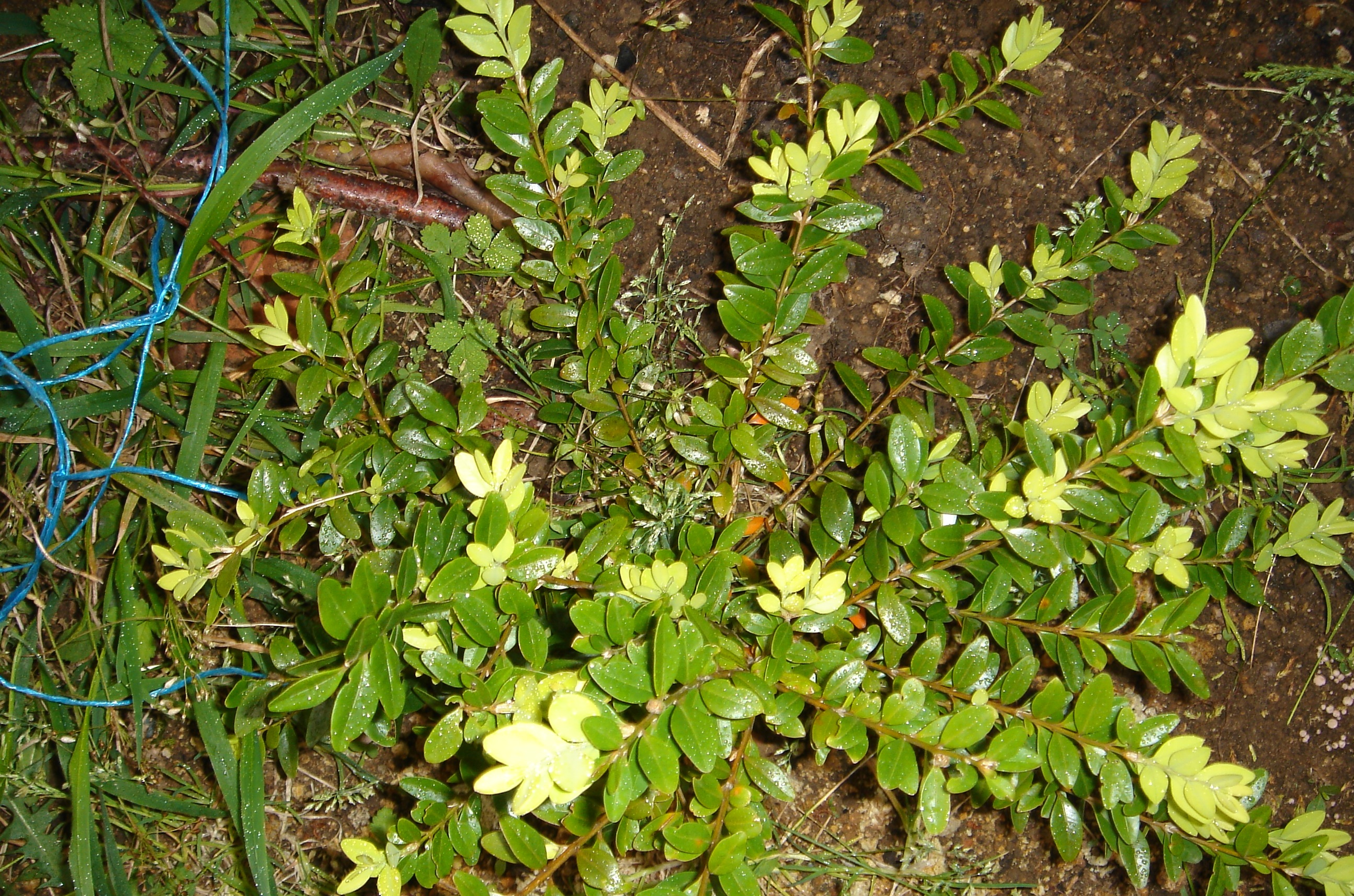 Buxus sempervirens